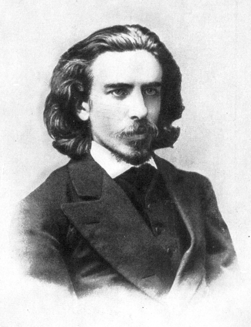 Vladimir Solovyev